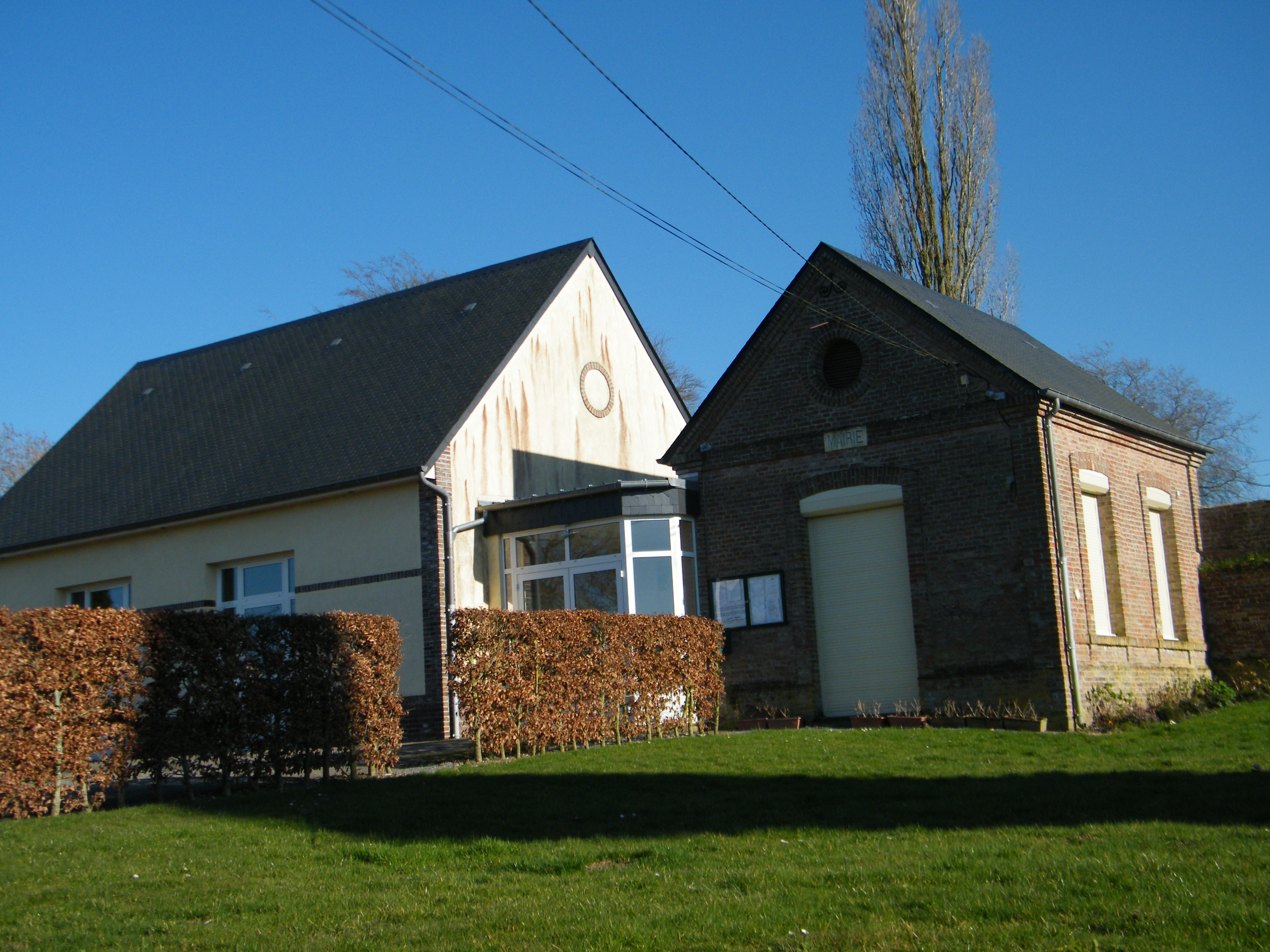 Mairie et salle municipale.